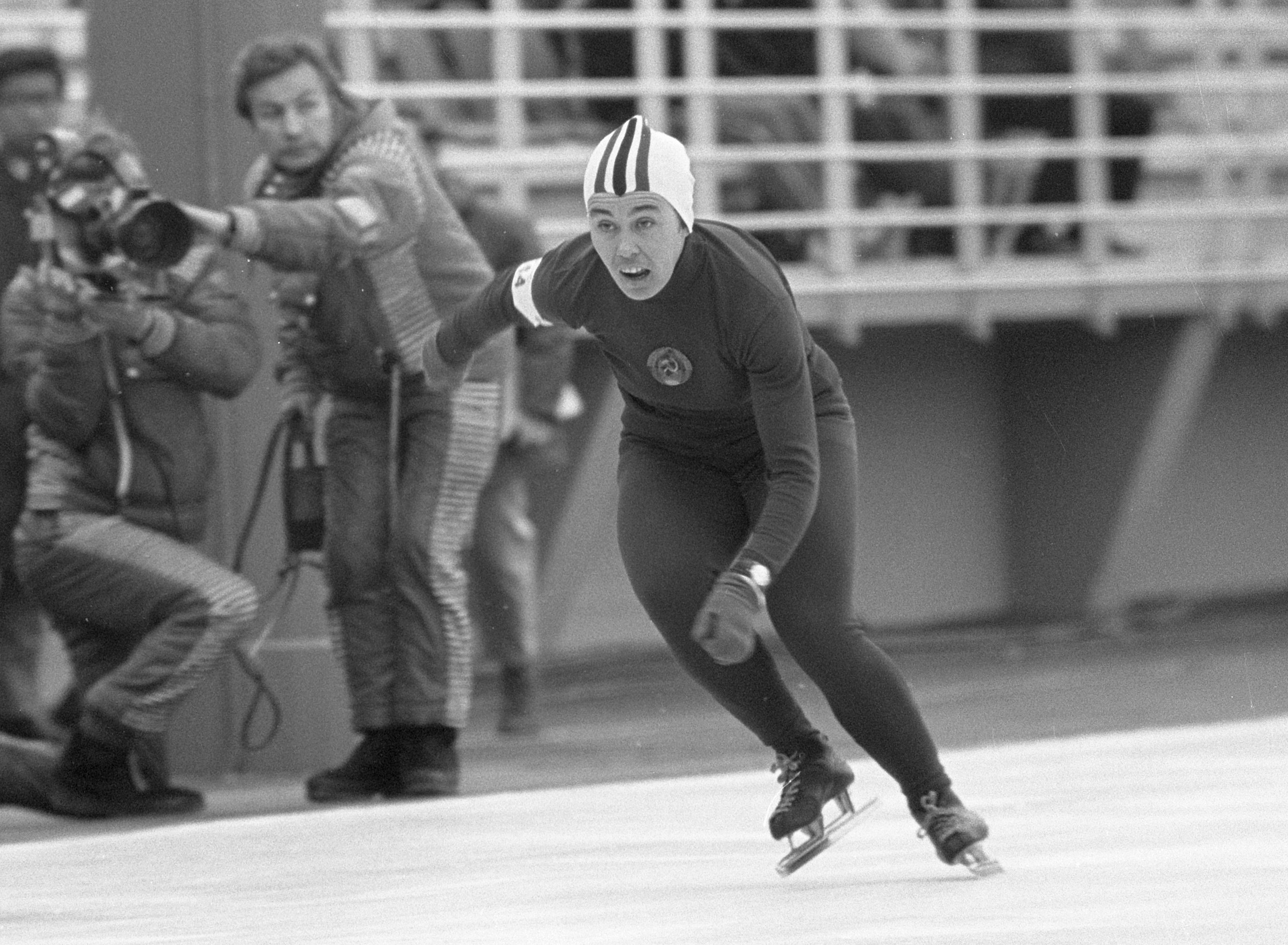 Olympische Spelen Grenoble, Egorova